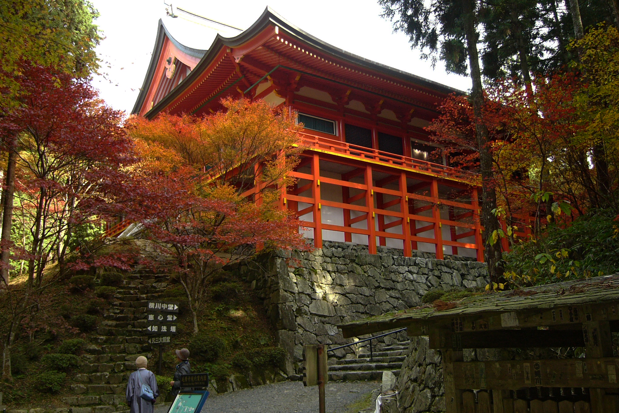 Enryaku-ji_Yokokawa-chudo (延暦寺横川中堂), Otsu, Shiga prefecture, Japan